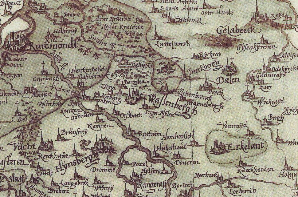 Lage von Erkelenz im Manuskriptatlas des Christian Sgrothen